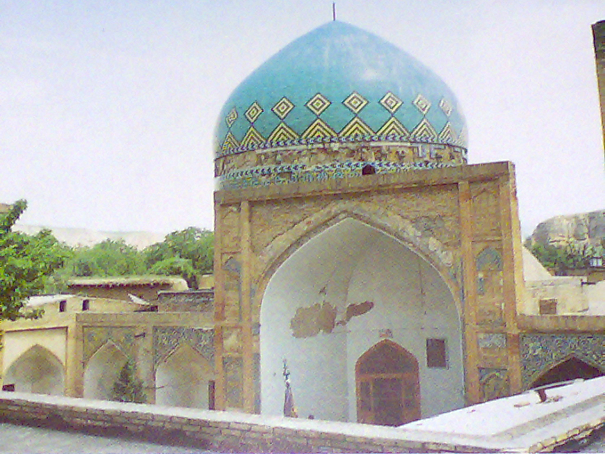 مسجد جامع کبود گنبد کلات نادر